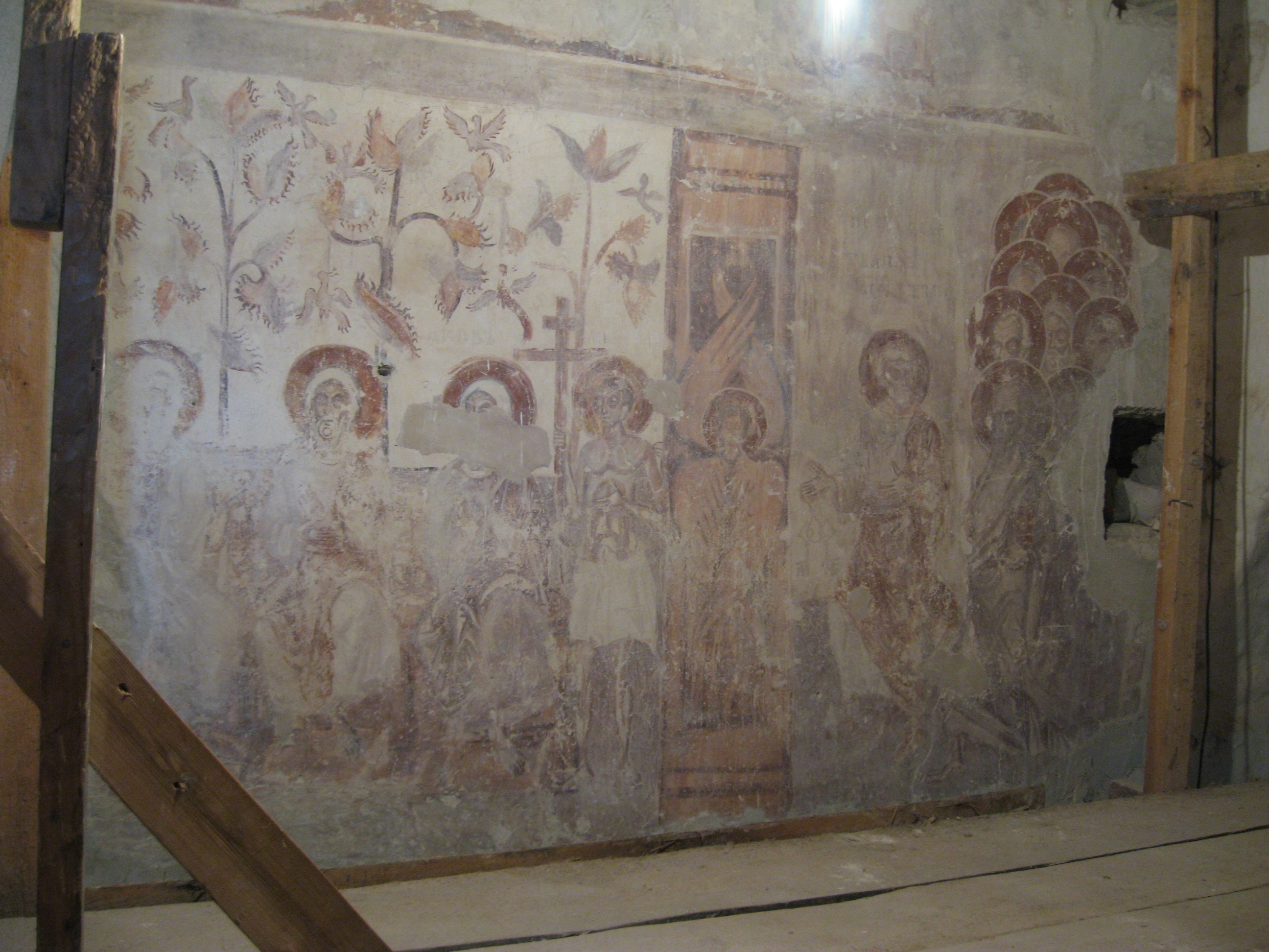 Фреска собора Снетогорского монастыря. 1313 год.